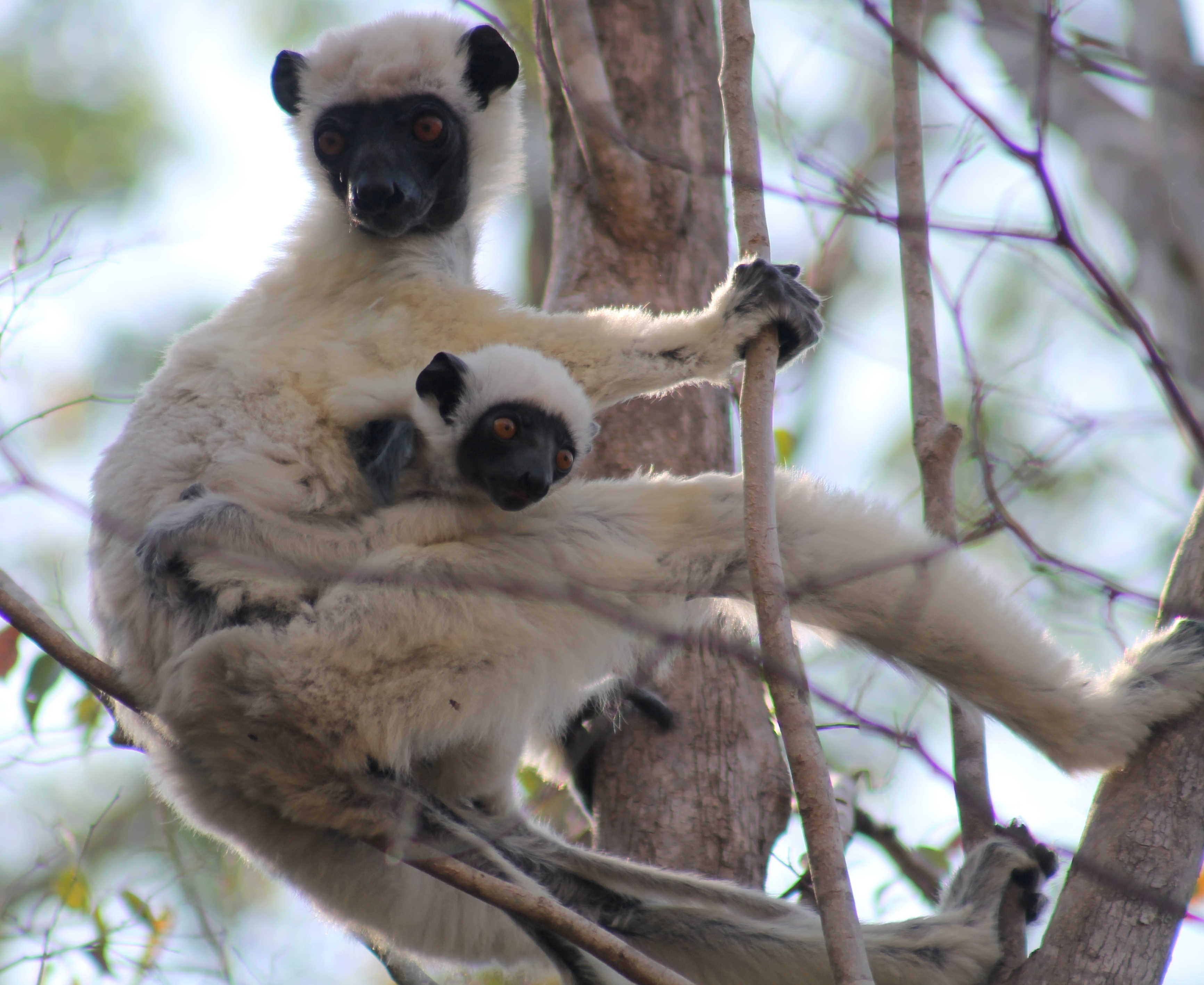 Von der Deckens sifaka in de Tsingy